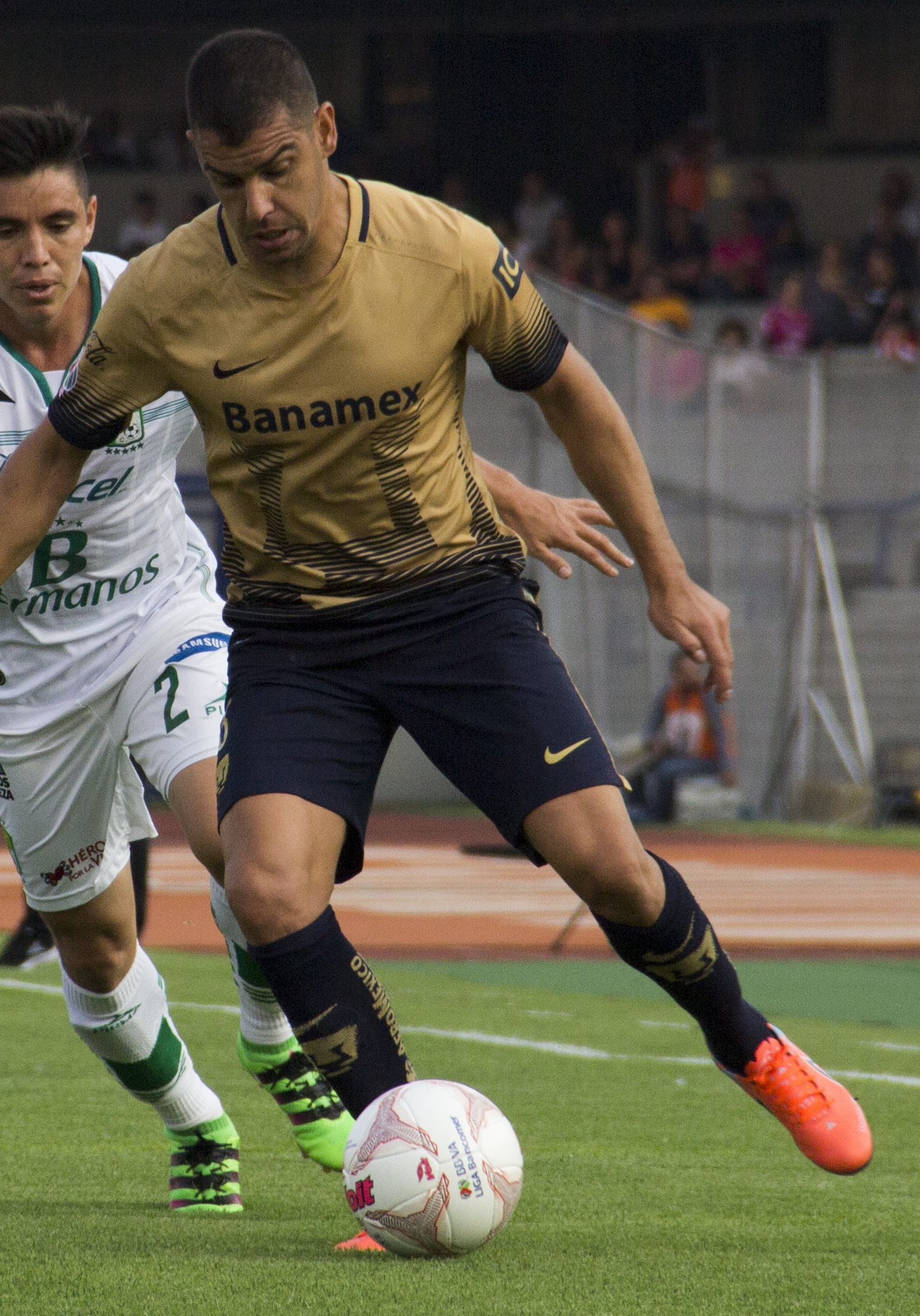 Pumas vs León